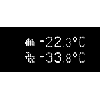 Состояние дорожного покрытия и воздуха